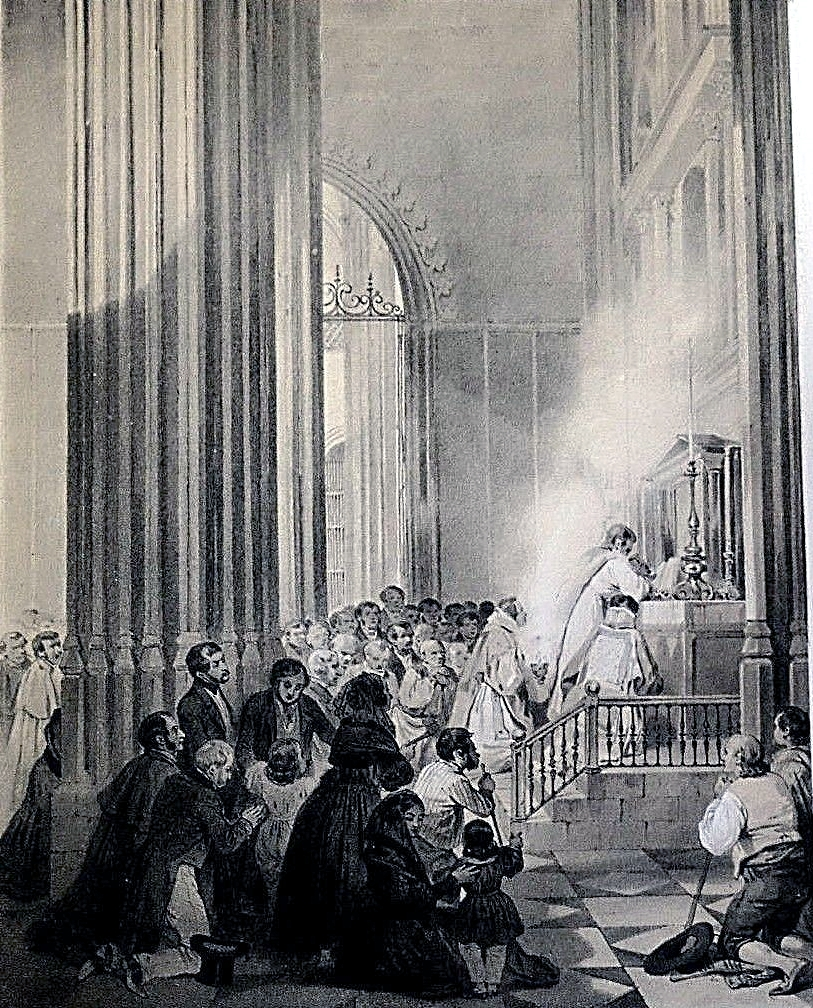 l’illustration de España artística y monumental, Genaro Pérez de Villa-Amil. París, 1842-1844